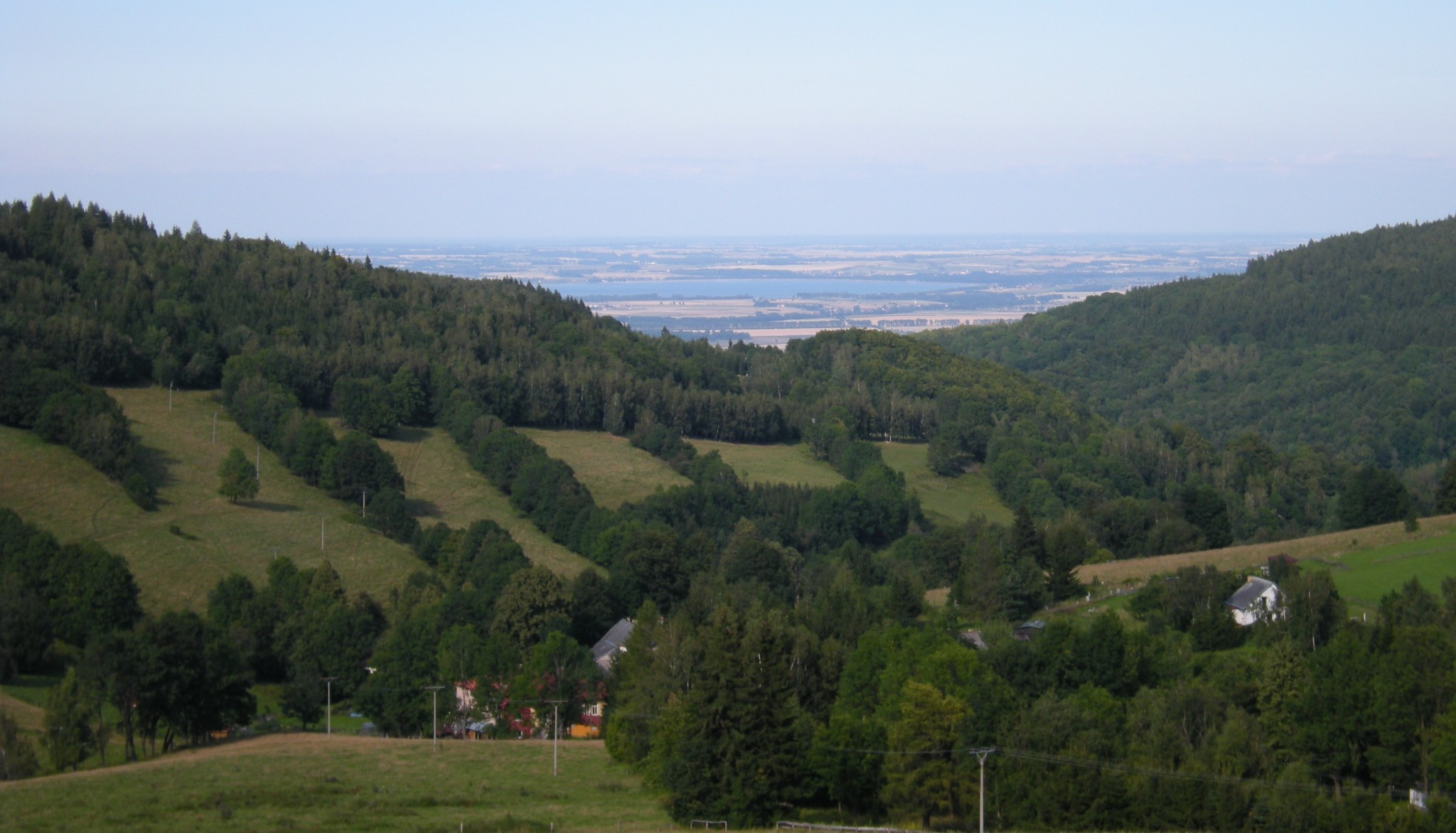 Widok na miejscowość Zálesí w Czechach. W oddali Obniżenie Otmuchowskie z Jeziorem Otmuchowskim i Wzgórza Strzelińskie.